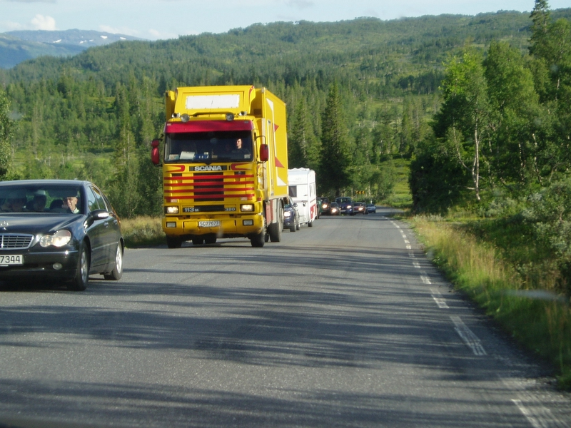 Korgenfjelltunnelen (gammelveien